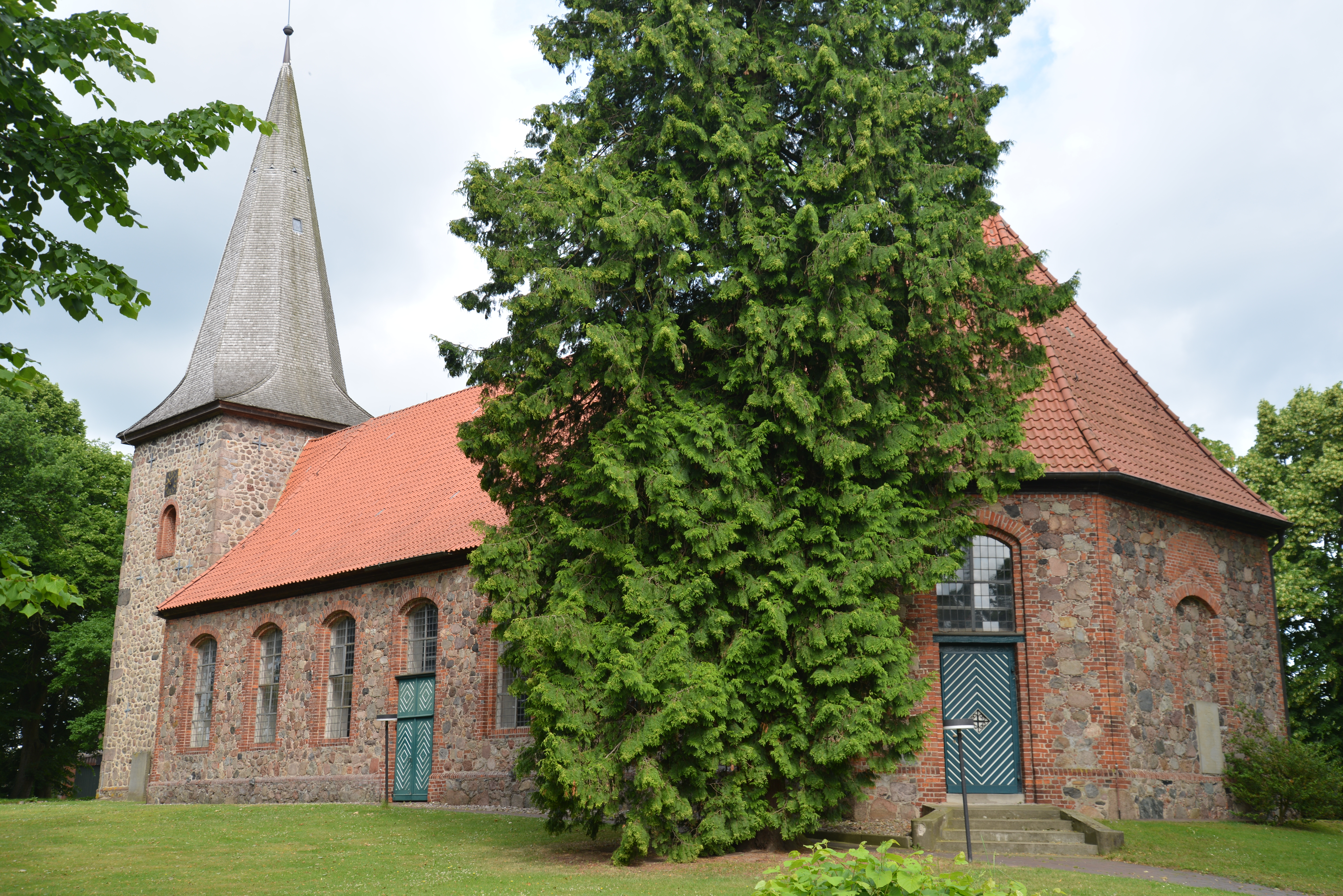 Die Kirche St. Johannis in Siebeneichen wurde 1753 aus nordischen Geschieben gebaut, der Turm wurde 1909 erneuert. Auf diesem Bild wird die Bauart deutlich. Man sieht die unterschiedliche Bauweise von Kirchturm (aus gesetzten Findlingen mit Ecksteinen aus Granit erneuert) und Kirchenschiff (aus kleineren Findlingen und Backsteinbruch, mit Ecken aus Backstein), ebenso wie eine spätere Erhöhung des Kirchturms.